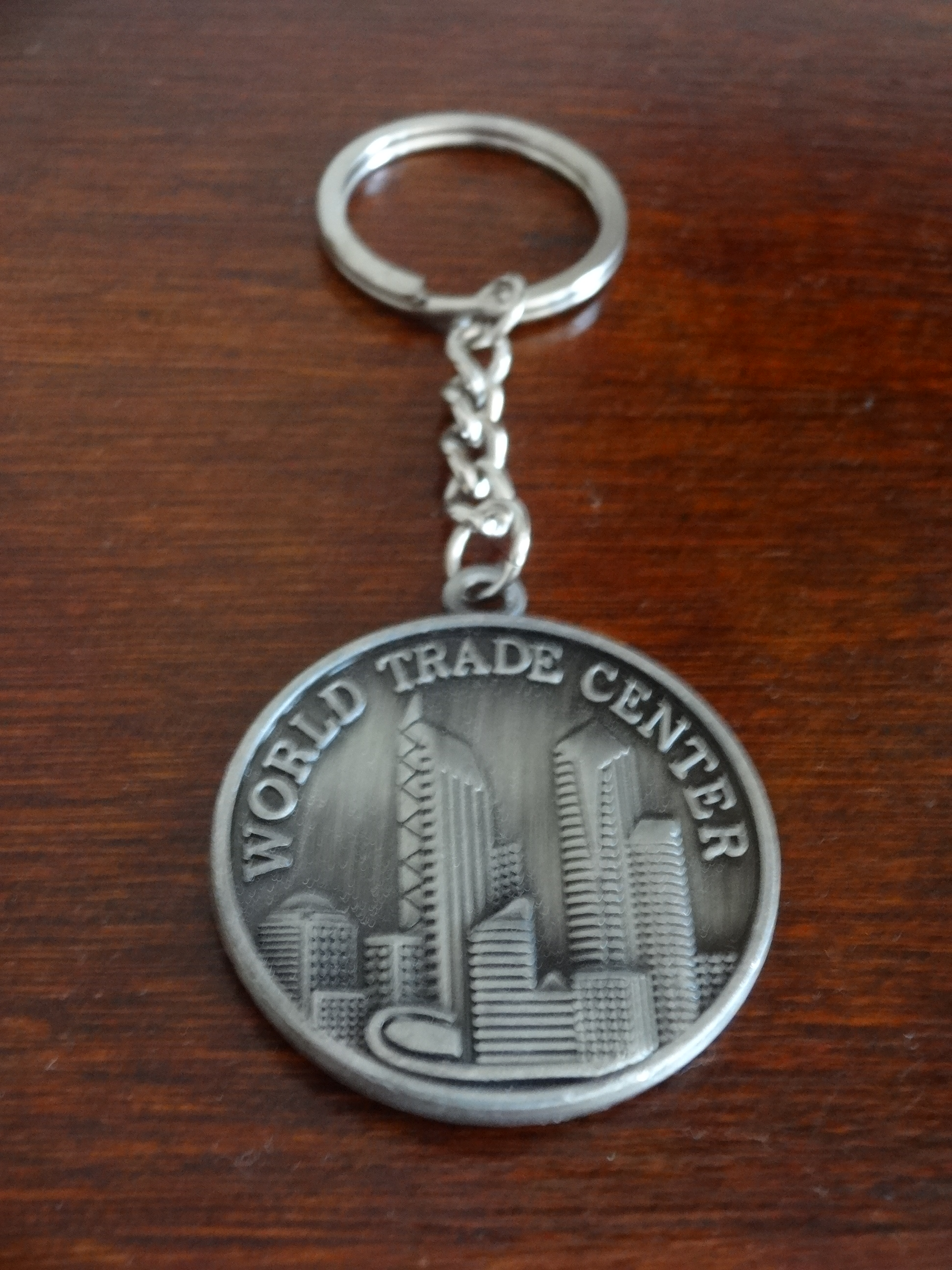 Chaveiro de Nova Iorque.